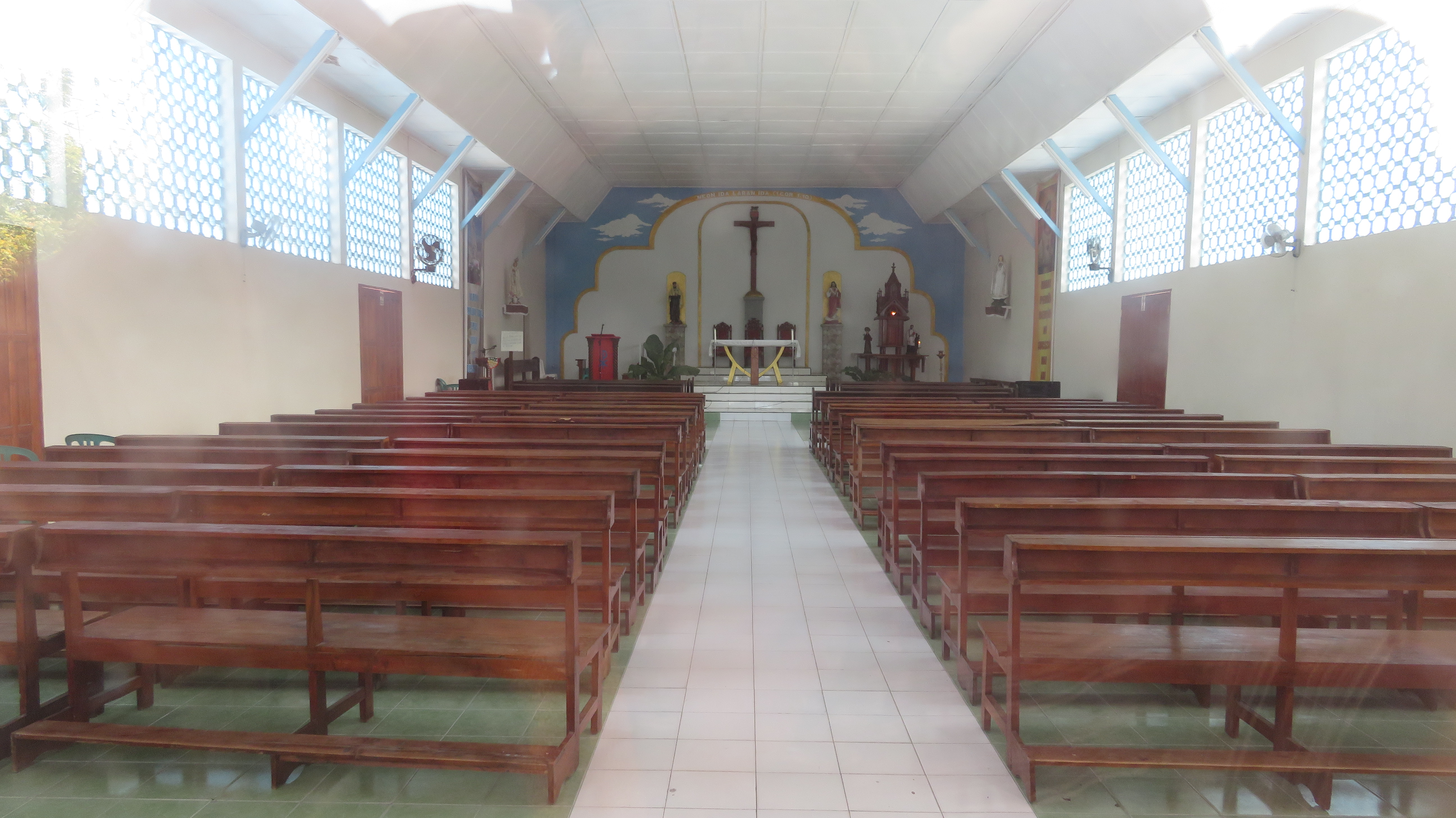 Pfarrkirche S. Joao de Brito, Liquiçá, Dato (Liquiçá), Osttimor